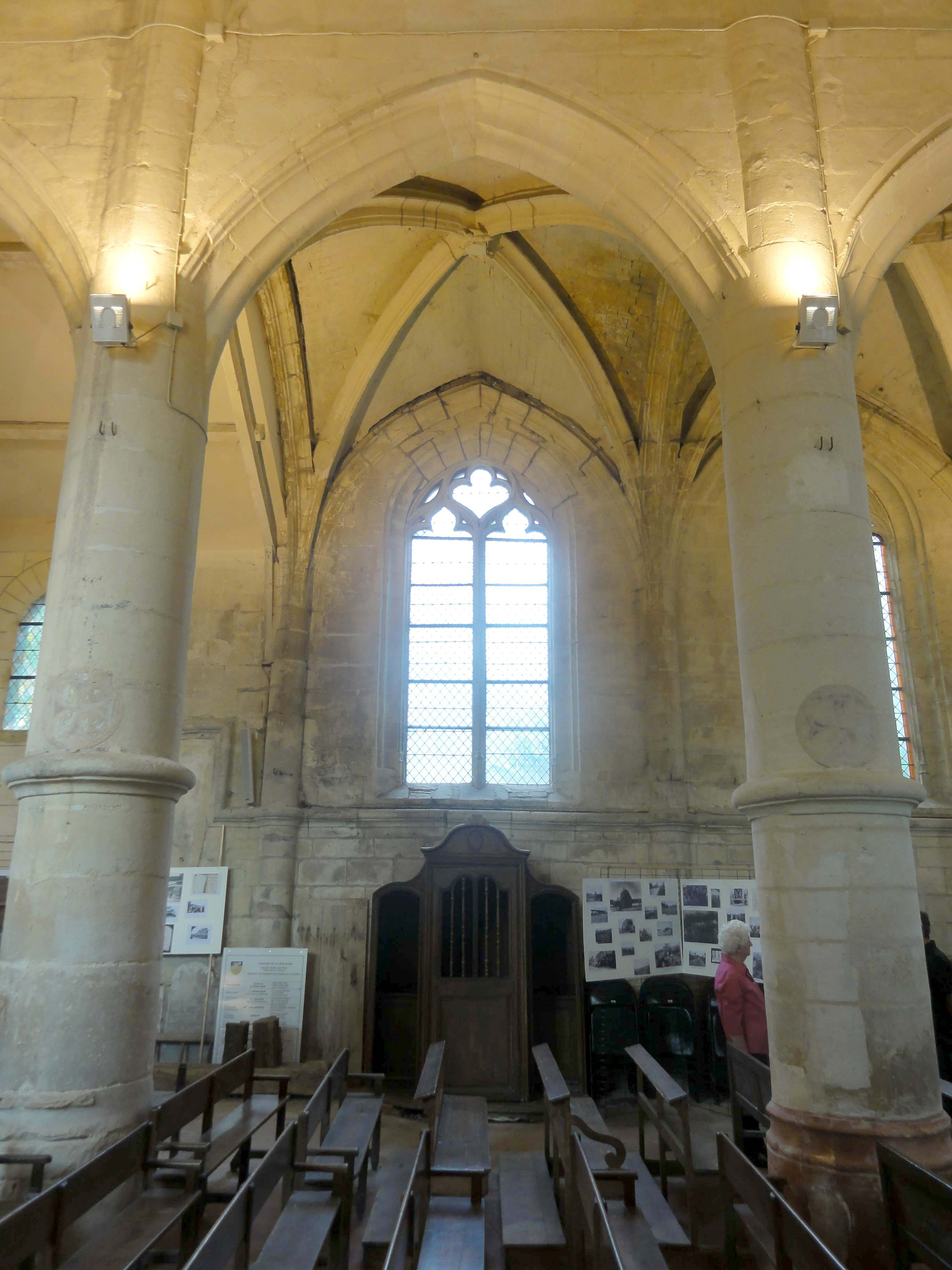 Chœur, 1ère grande arcade du nord.